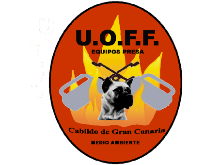 Ante la creación de los Equipos Presa en 2002, unidades contraincendios del Cabildo de Gran Canaria, el responsable de esta unidad decide realizar un logotipo que identifique a estos equipos. A partir del logotipo se crea el parche que los especialistas llevan en la vestimenta desde aquella fecha. El logotipo a sido difundido ampliamente por diferentes medios, al ser una creación libre y con el ánimo de dar a conocer la unidad en muchos ámbitos, tanto sociales como profesionales,...